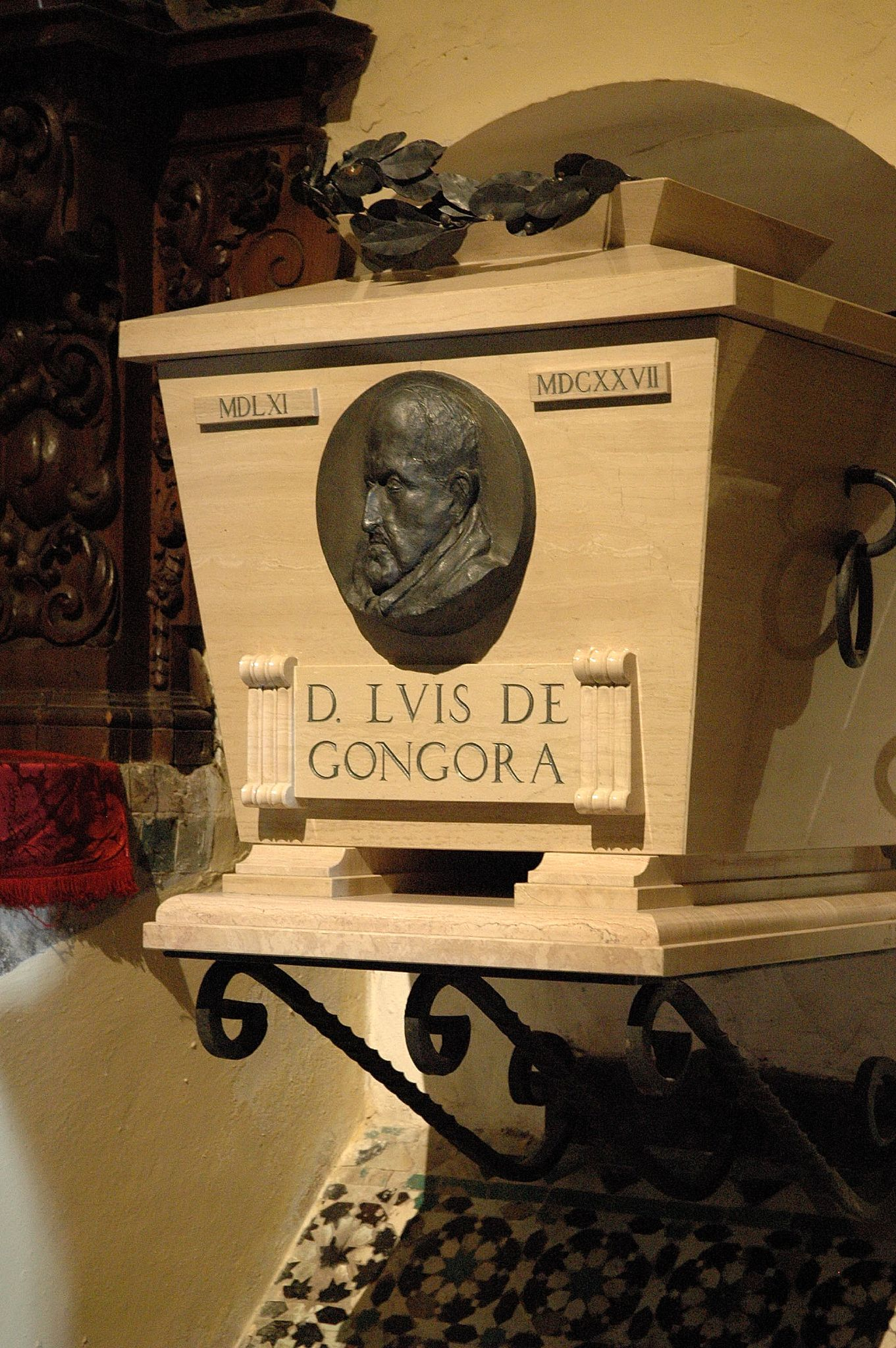 Tumba de Luis de Góngora y Argote en la capilla de San Bartolomé de la Mezquita de Córdoba (España).